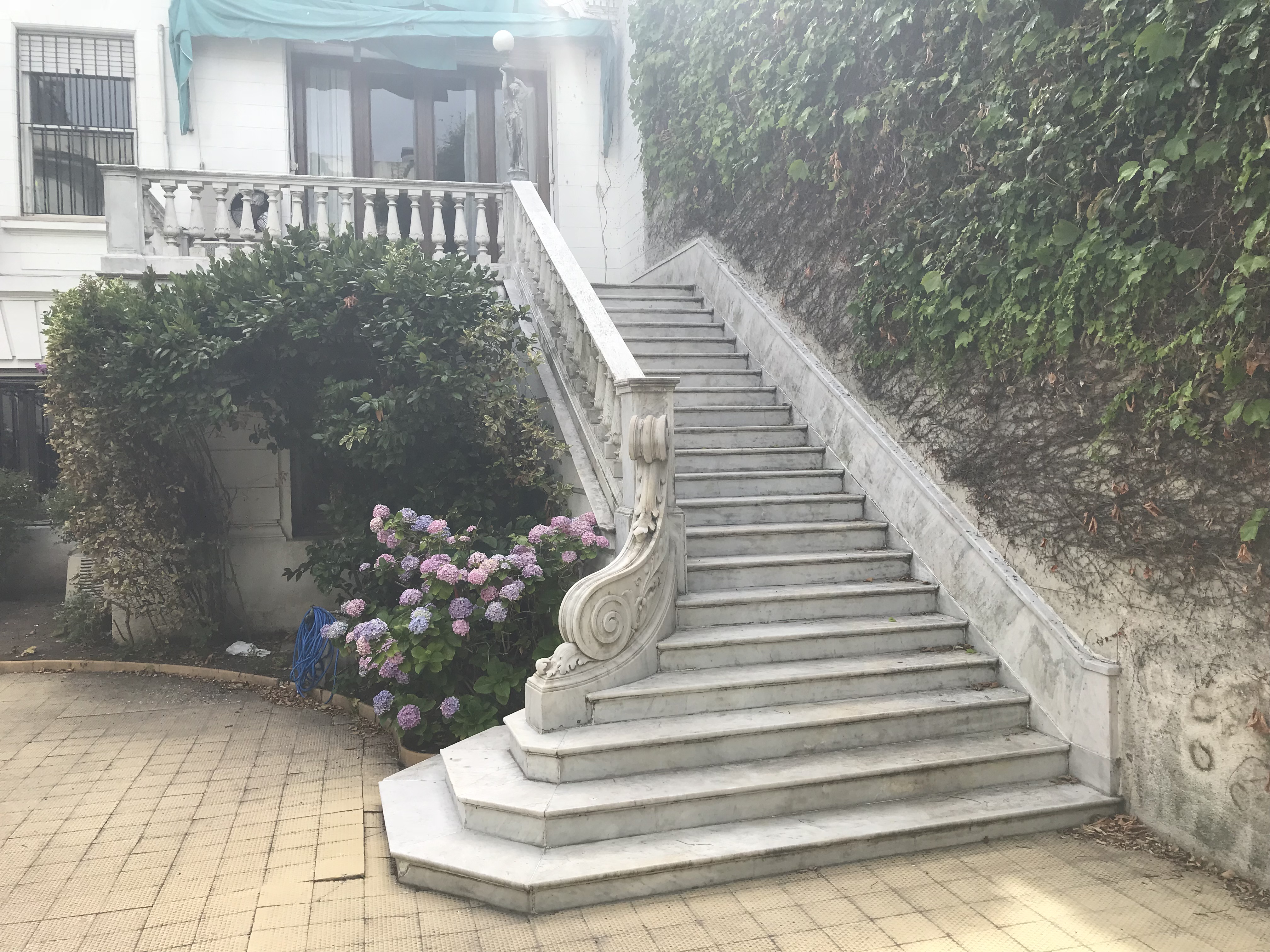 escalera patio trasero